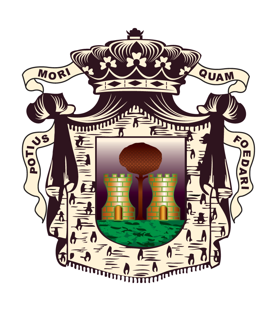 Escudo del Municipio de Floridablanca, Santander (Colombia) El escudo del Municipio de Floridablanca fundado en la heráldica española, lleva inscrita en una cinta de argén la frase latina: "Potius mori quam foedari", que traduce: "Antes morir que deshonrarse", y fue adoptado mediante el Decreto 85 del 7 de noviembre de 1977, siendo alcaldesa doña Carmen Cecilia Pérez Gómez, para honrar y perpetuar en la memoria de los Florideños, el origen del nombre de la ciudad, dado en honor de Don José Moñino y Redondo, Conde de Floridablanca.